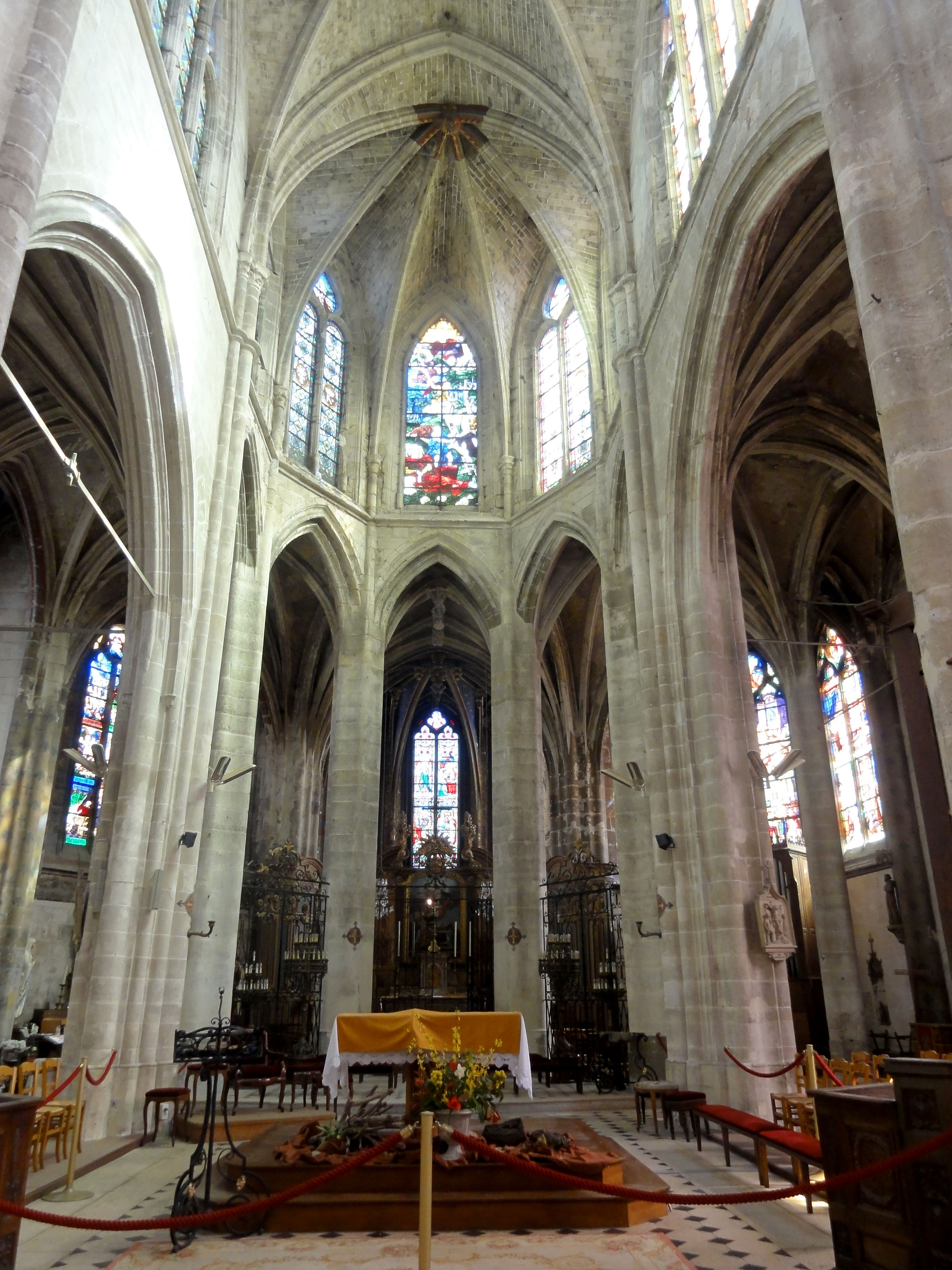 Chœur, vue vers l'est.